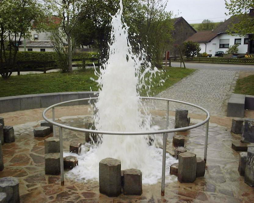 Kaltgeysir Brubbel in Wallenborn, Eifel Fotograph: Walter Koch